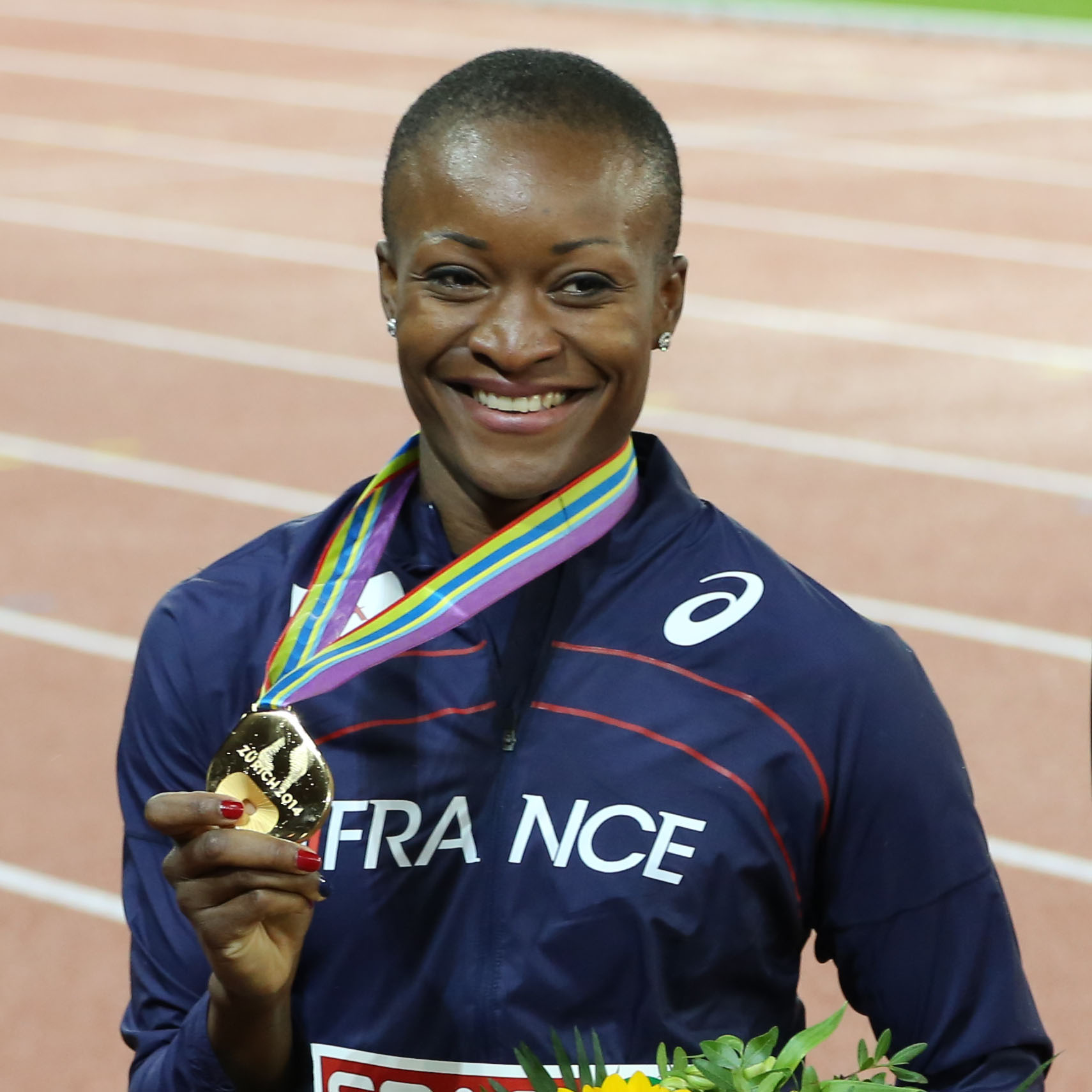 Antoinette Nana Djimou avec sa médaille d'Or gagnée à Zurich le 15 août 2014